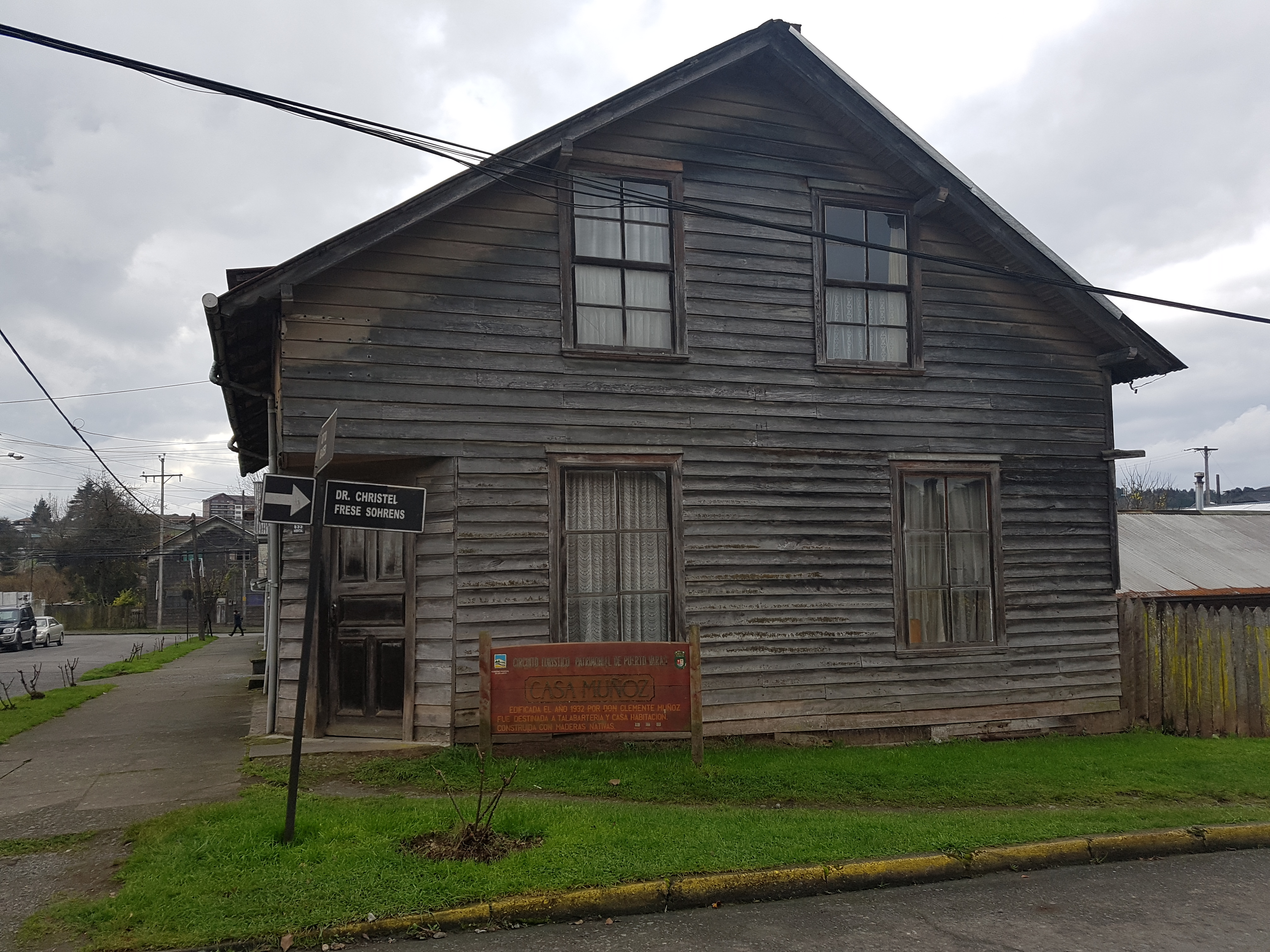 Casa Muñoz, edificio ubicado en Puerto Varas y parte de la zona típica de Puerto Varas